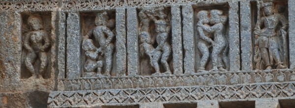 ಕನ್ನಡ: ಹೊಯ್ಸಳ ಶೈಲಿಯ ಕಾಮಶಿಲ್ಪಗಳು